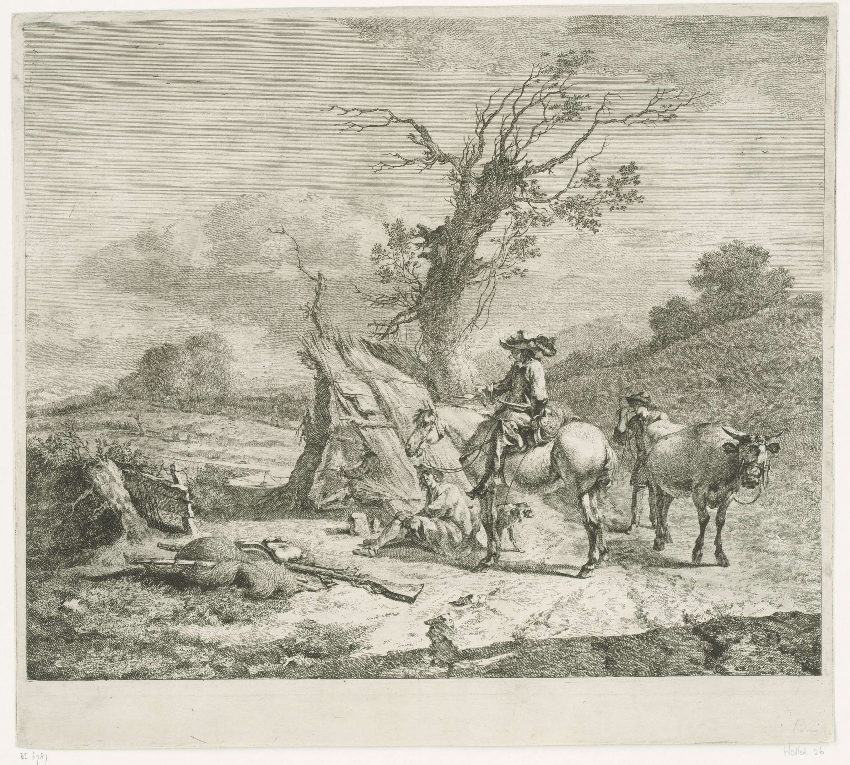 Vinkenbaan met vinker of vogelvanger die in schuilhut wacht totdat hij het net kan laten vallen. Een vogelvanger met attributen te paard is in gesprek met een man zittend op de grond bij een opgerold net en een jachtgeweer.; Iconclasscode: 43C131; print